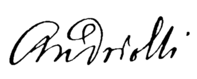 Autograf Michała Elwiro Andriollego.